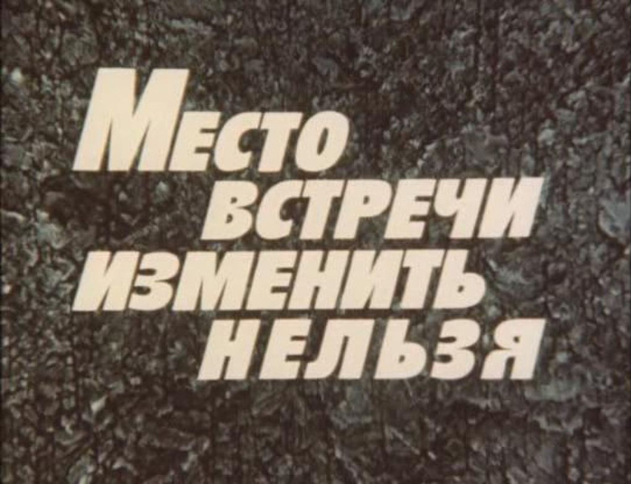 Титры фильма "Место встречи изменить нельзя"